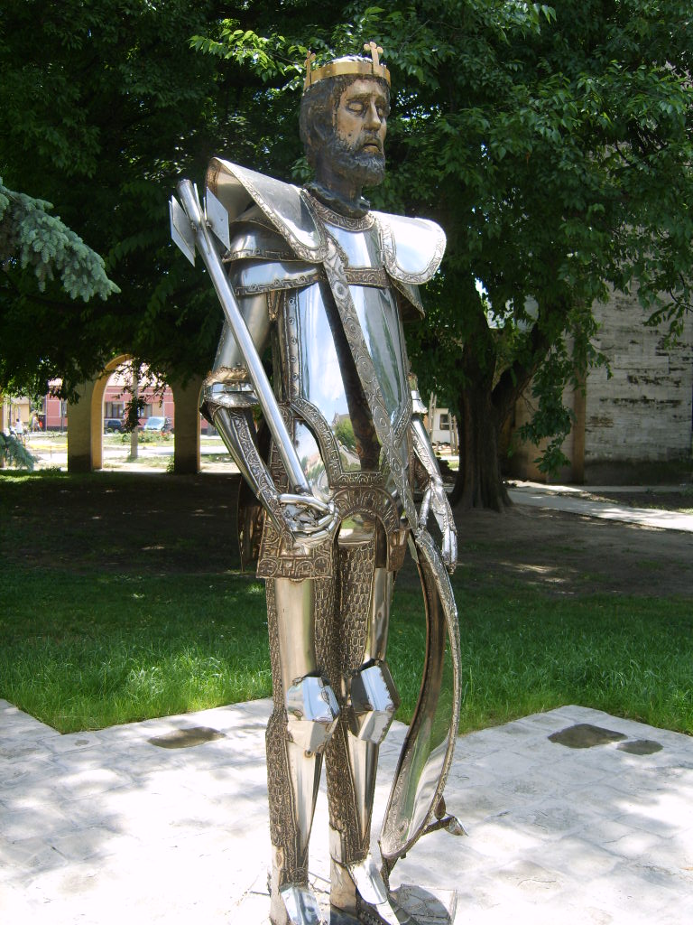 II. Lajos szobra Mohács főterén